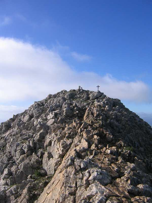 Cumbre del Udalaitz (1.119 m) Mondragón, Guipúzcoa, País Vasco (España).